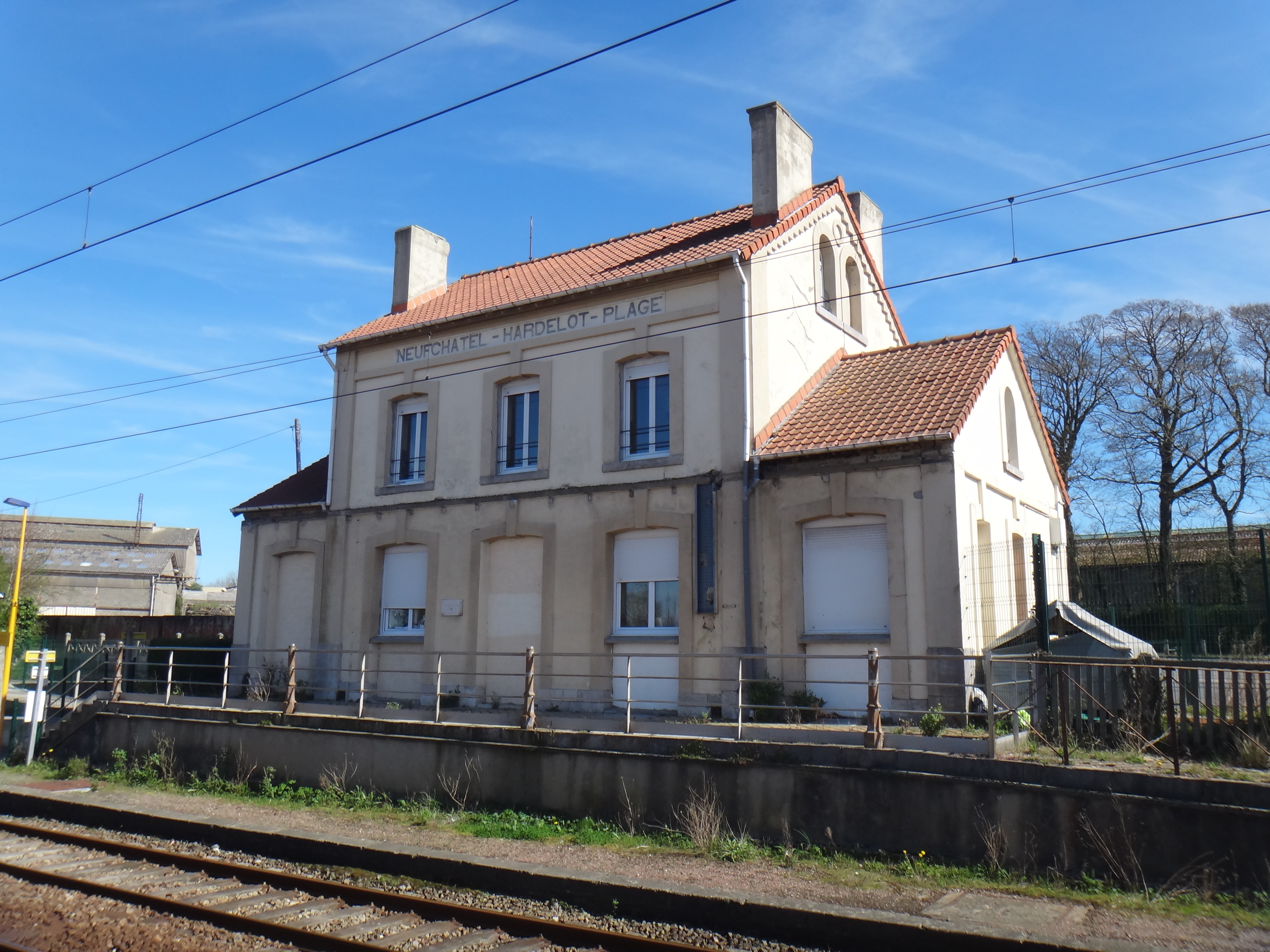 Gare de Neufchâtel-Hardelot, Pas-de-Calais, France, en 2014